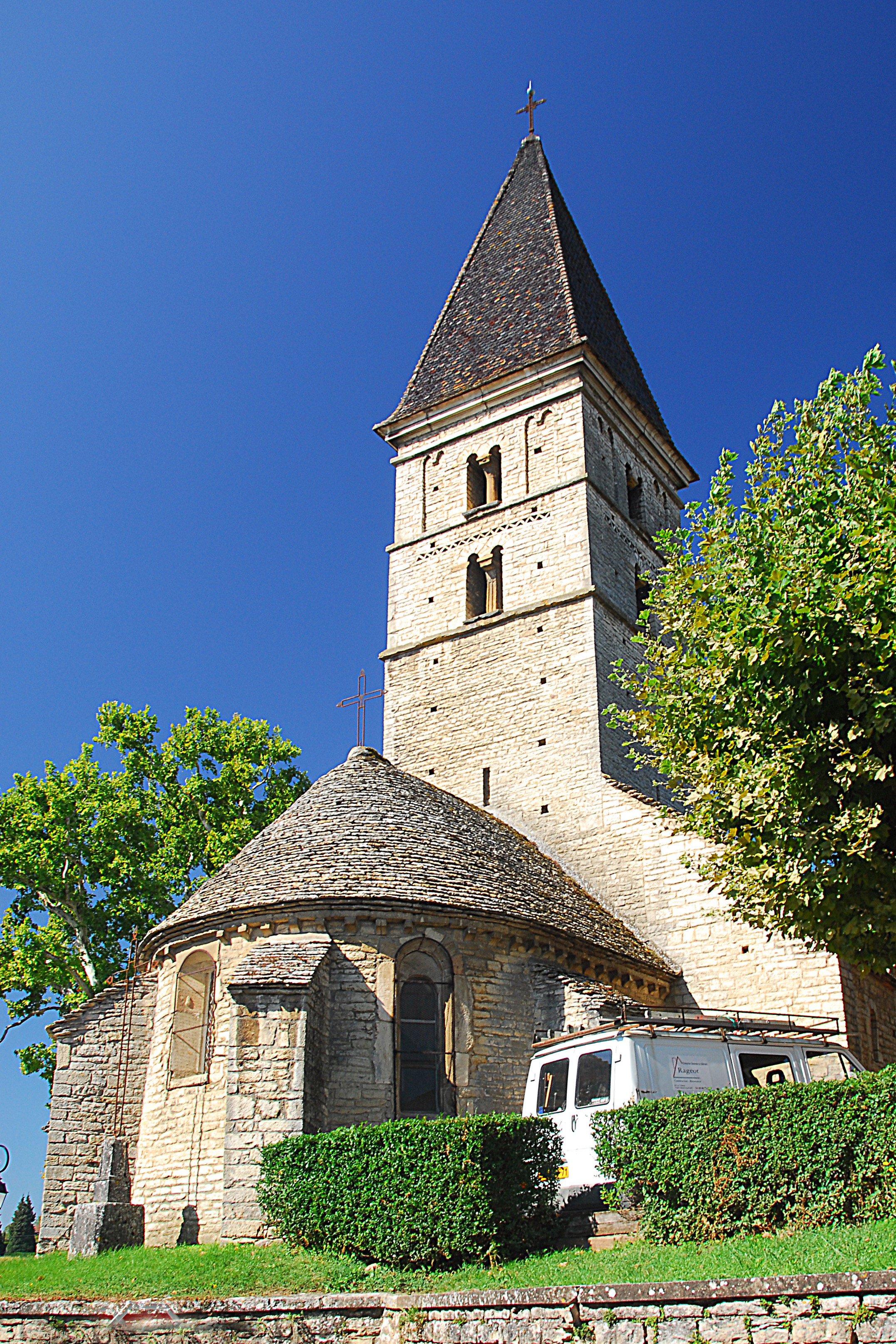 St-Basrthélémy,Farges, Chorhaupt und Turm von NO